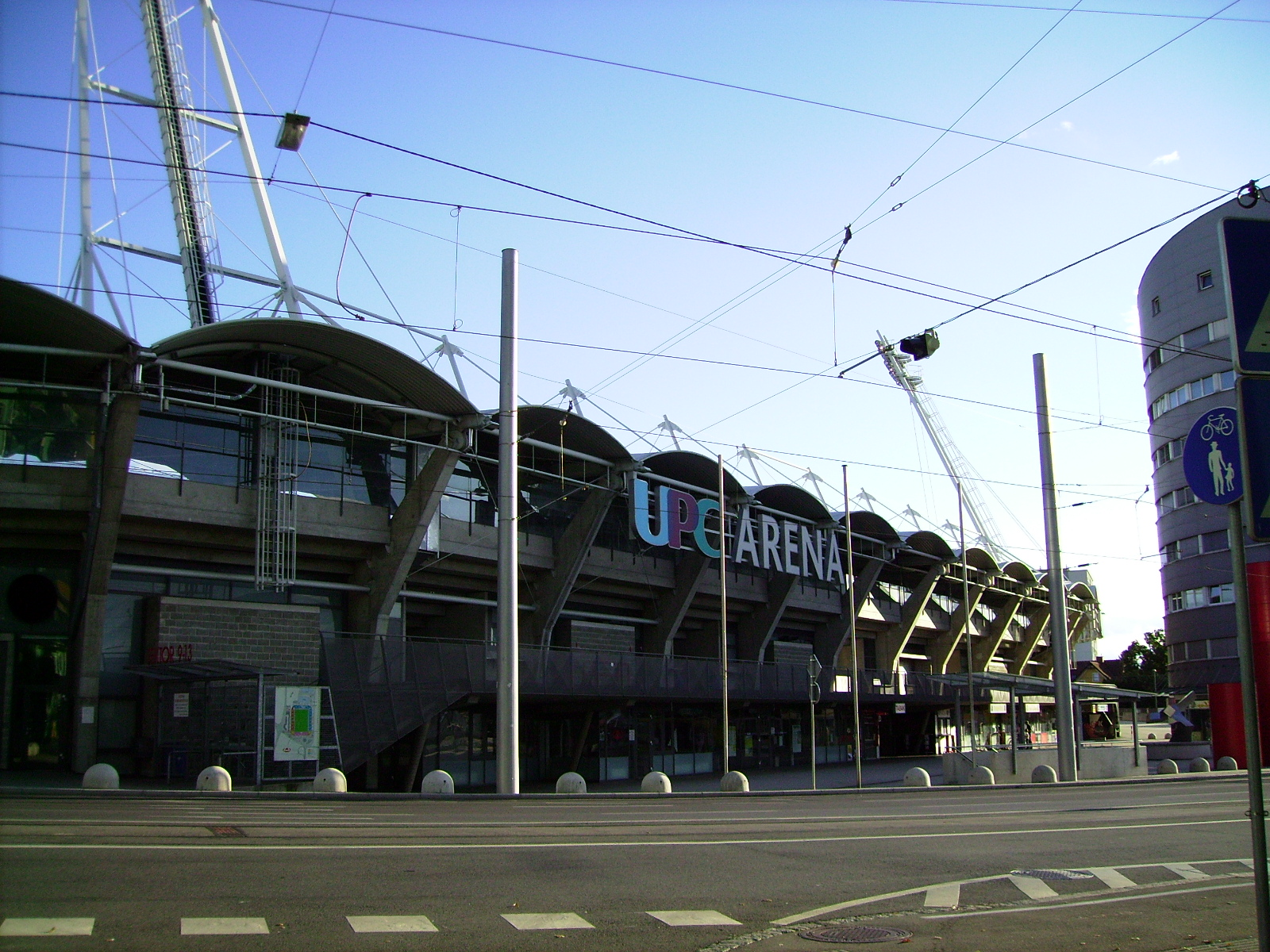 Nordfront der UPC-Arena